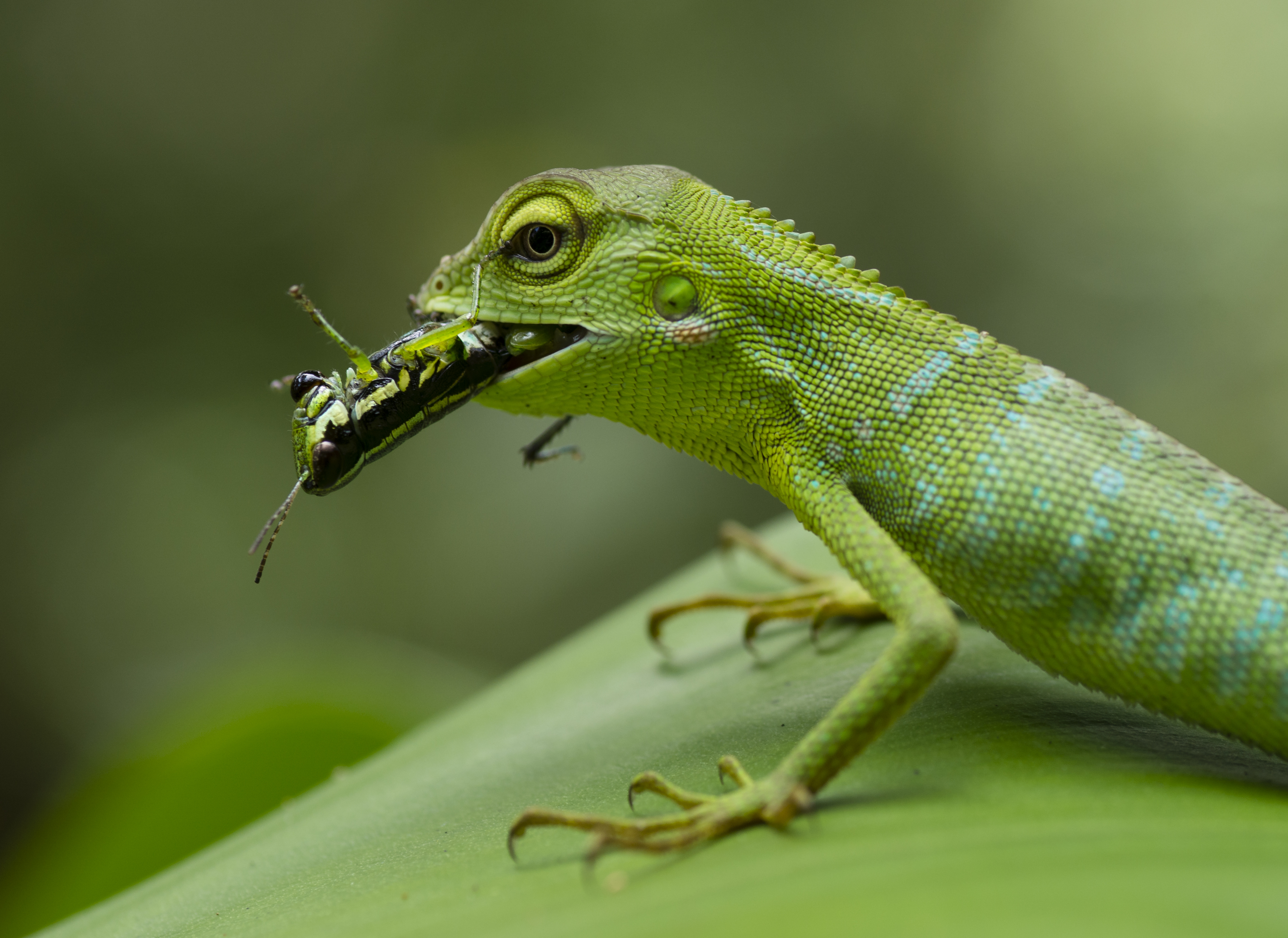 predasi merupakan salah satu bentuk interaksi yang ada di alam. terlihat bahwa seekor Bronchocela sedang memakan serangga dari ordo Orthoptera